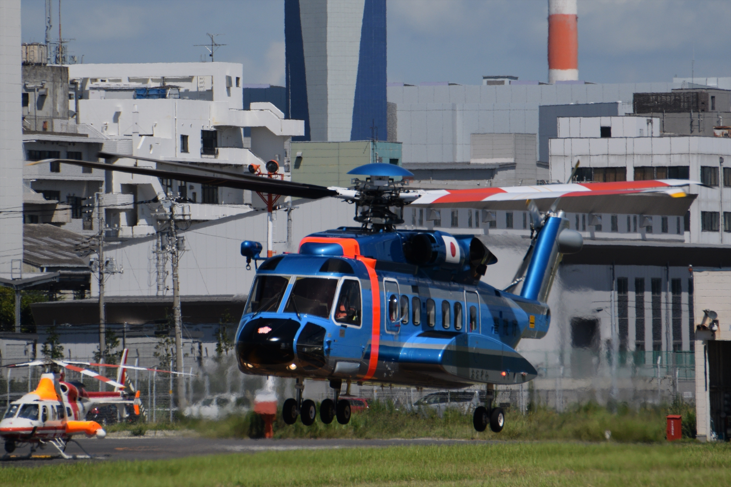 東京の警察のヘリコプター 東京ヘリポートにて、撮影